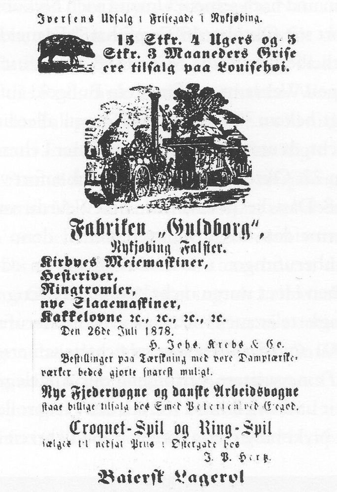 Werbung, unter anderem für Guldborg